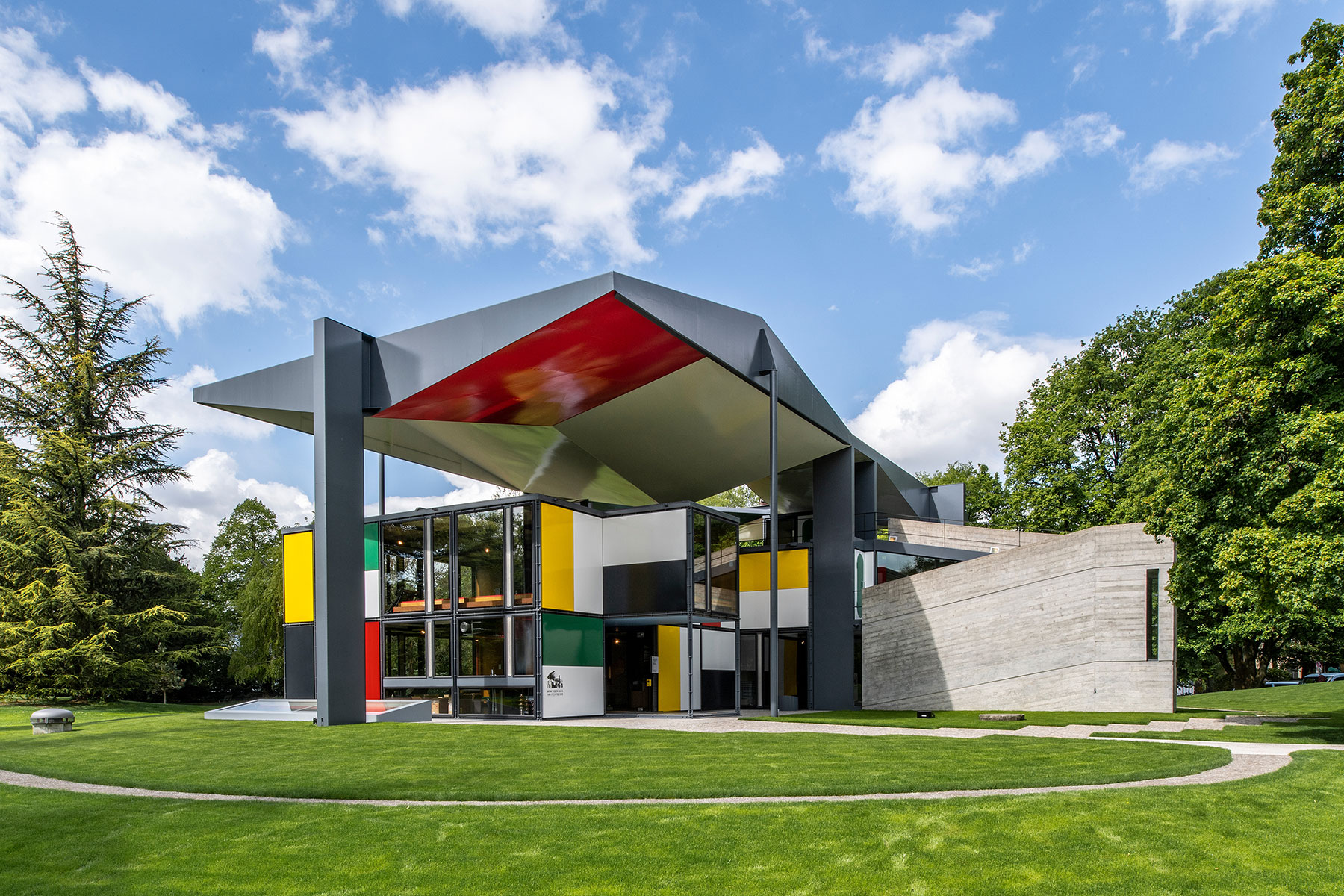 Pavillon Le Corbusier, Zürich, 2019, © ZHdK